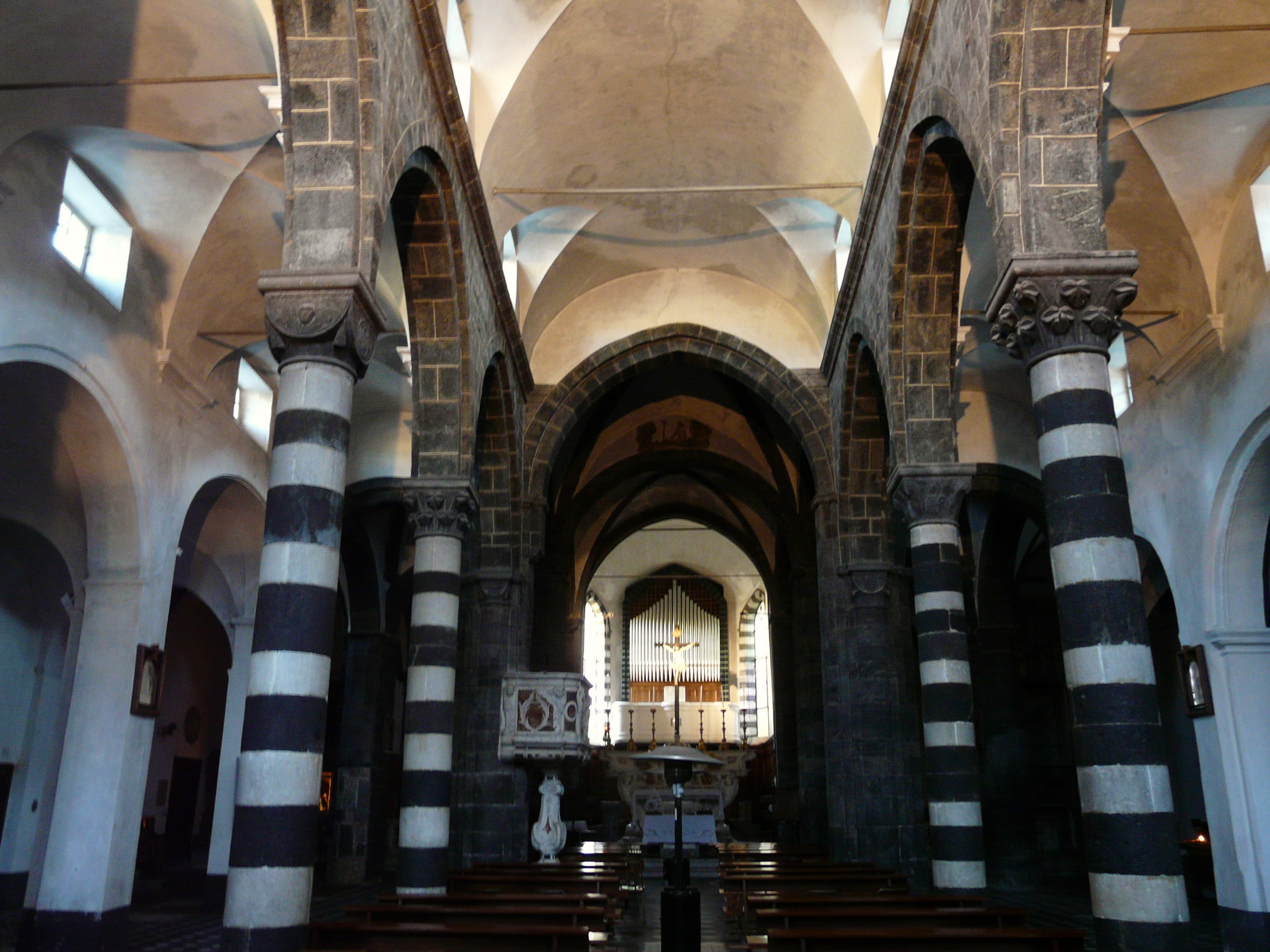 Navata centrale della chiesa di Sant'Andrea Apostolo, Levanto, Liguria, Italia